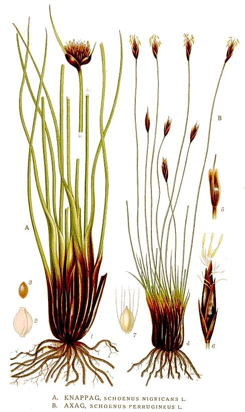 Original Description A. Knappag, Schoenus nigricans L. B. Axag, Schoenus ferrugineus L.